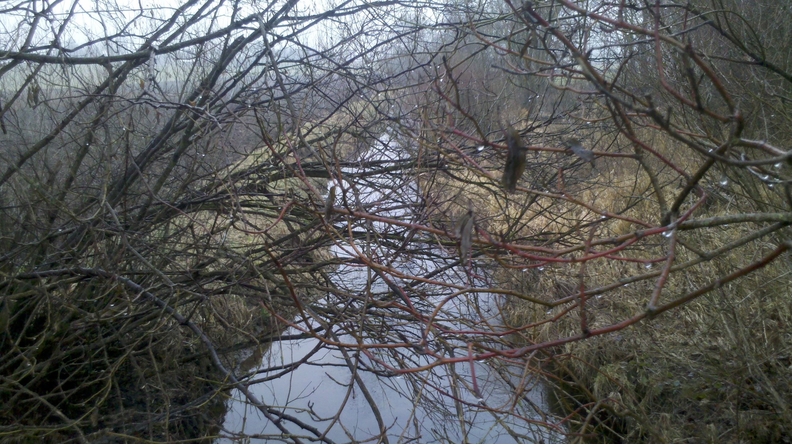 Fluss Braunau in Bayern Nähe Beyharting Blick nach Nordwesten